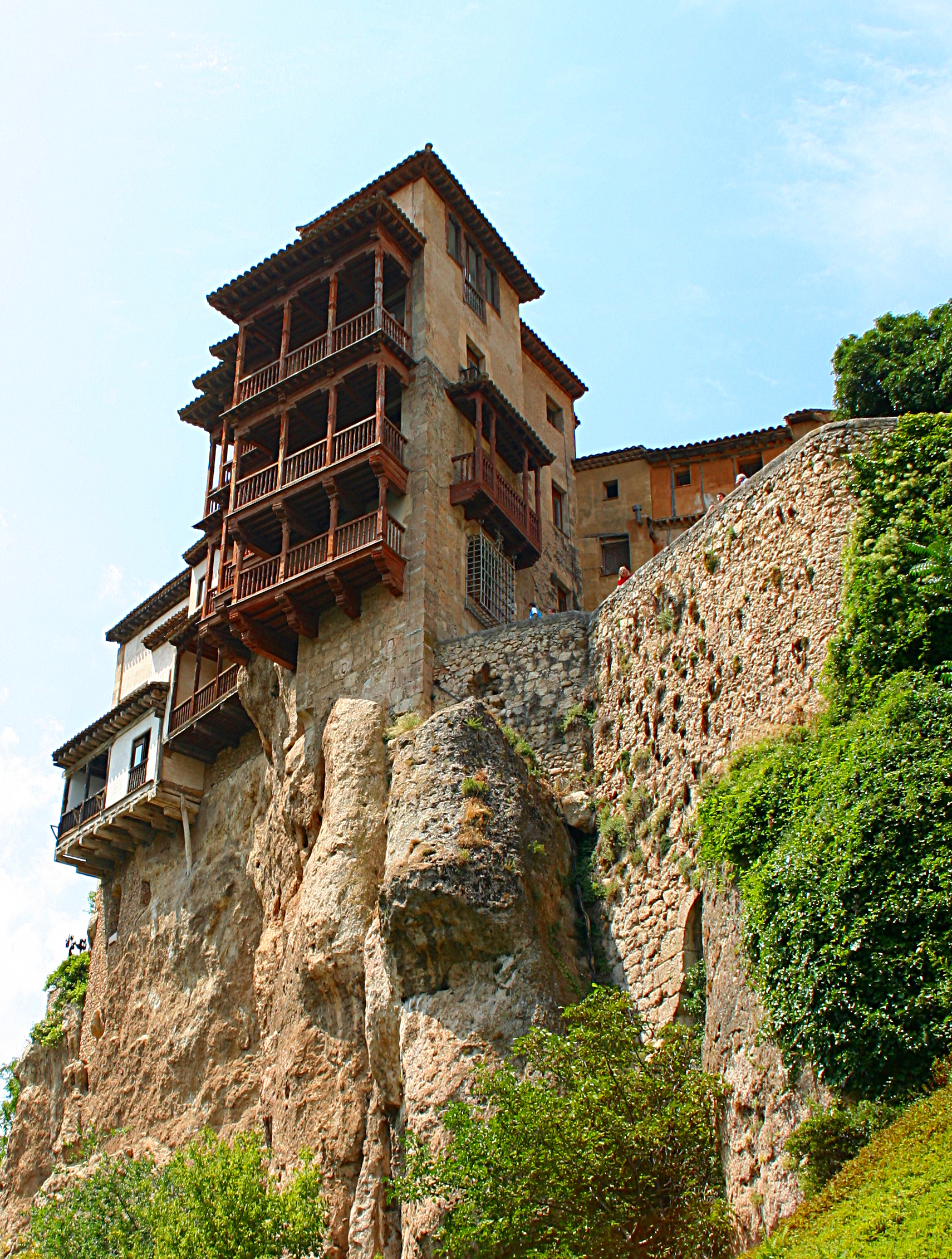 Casas colgadas en la ciudad de Cuenca, España.